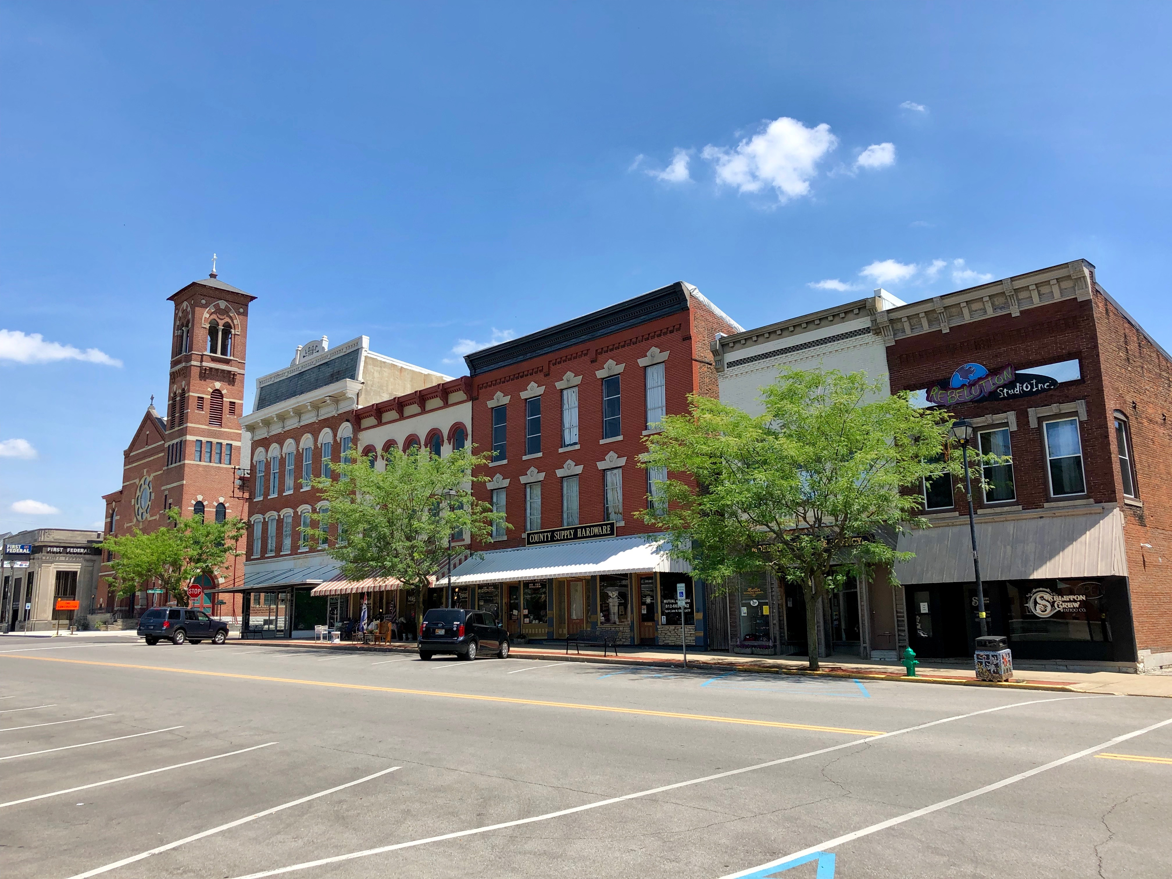 Franklin Street, Greensburg, IN